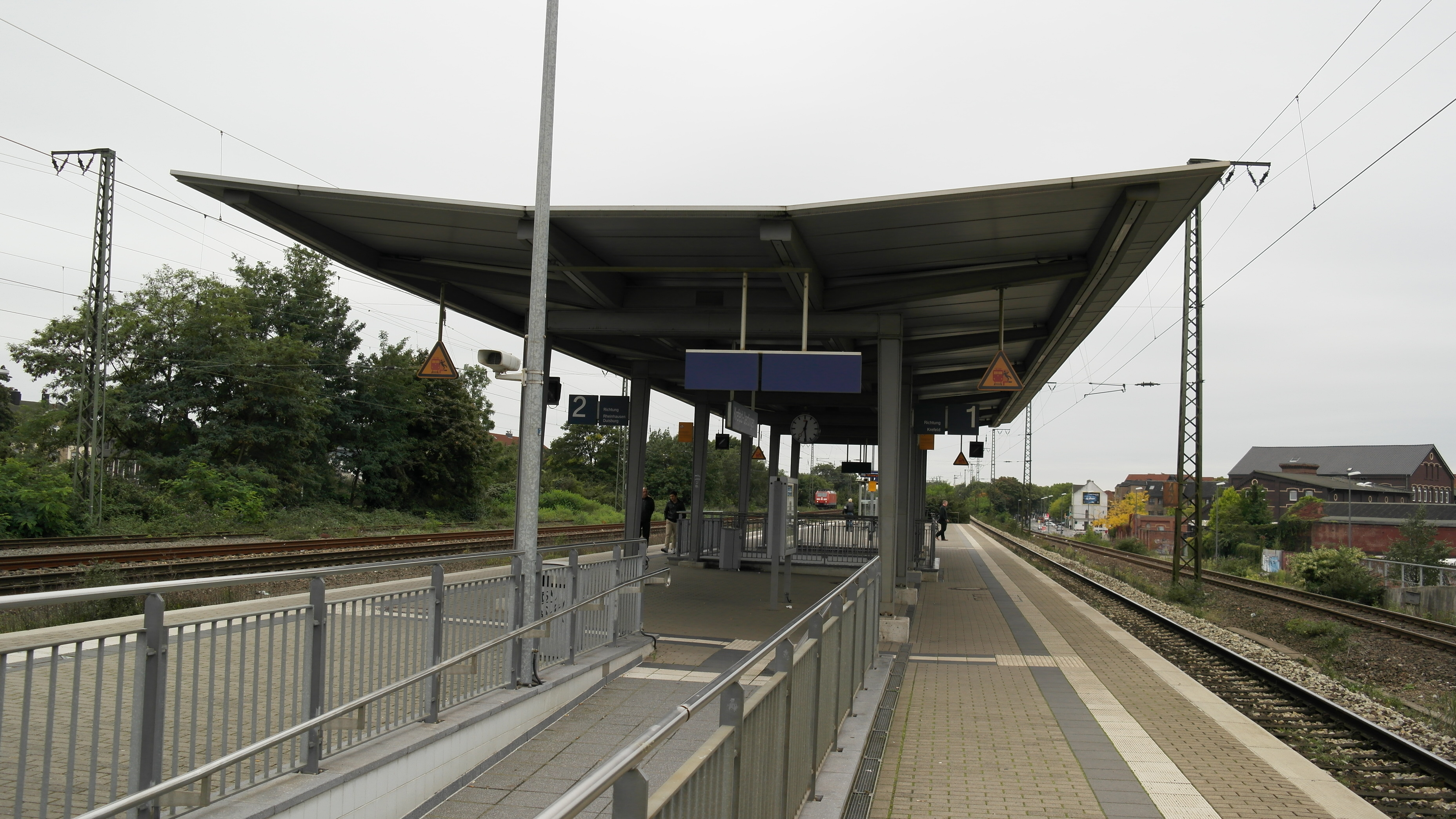 Bahnsteig des Bahnhofs Krefeld Uerdingen (Fahrtrichtung Krefeld Hbf)